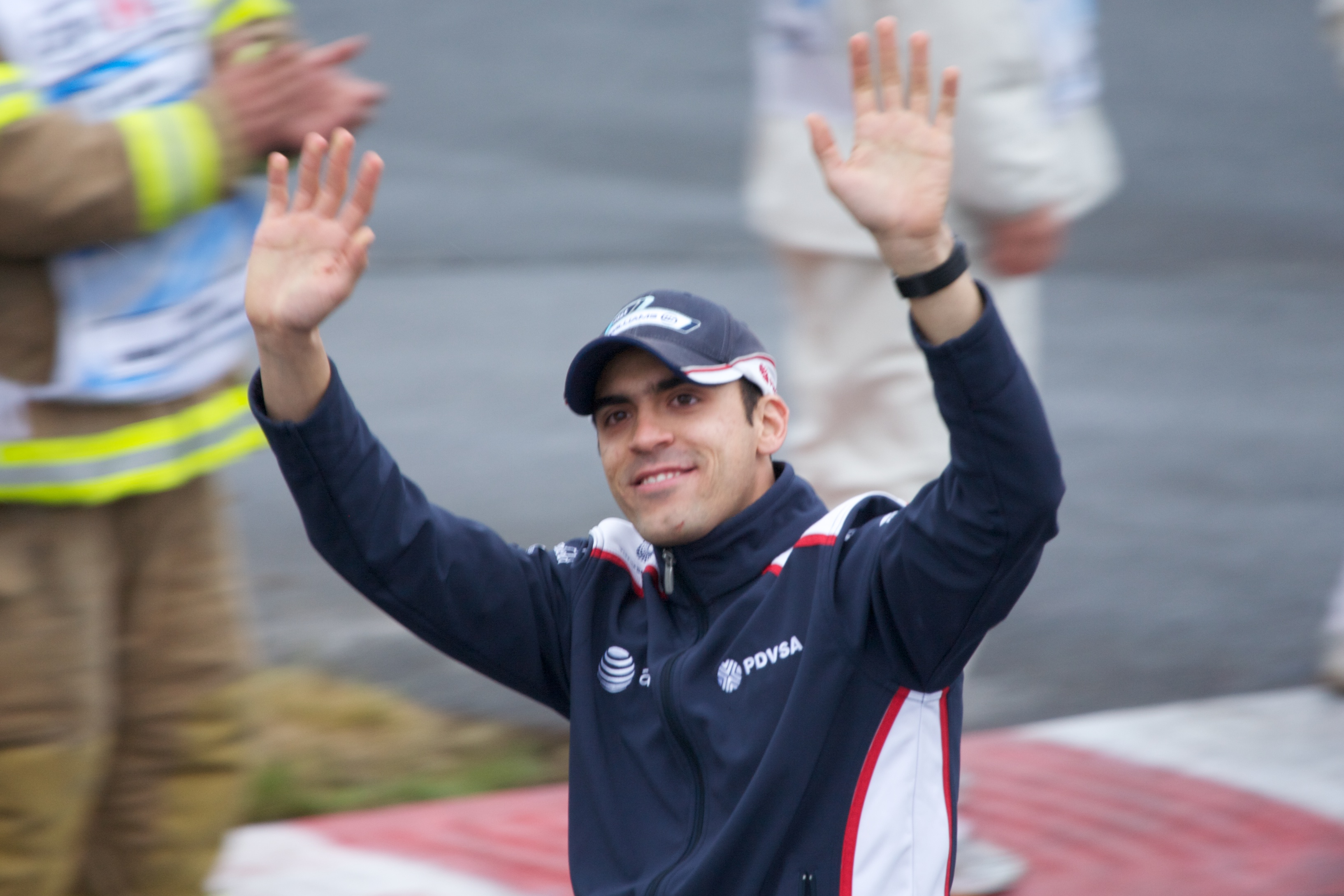 Pastor Maldonado di GP Kanada 2011